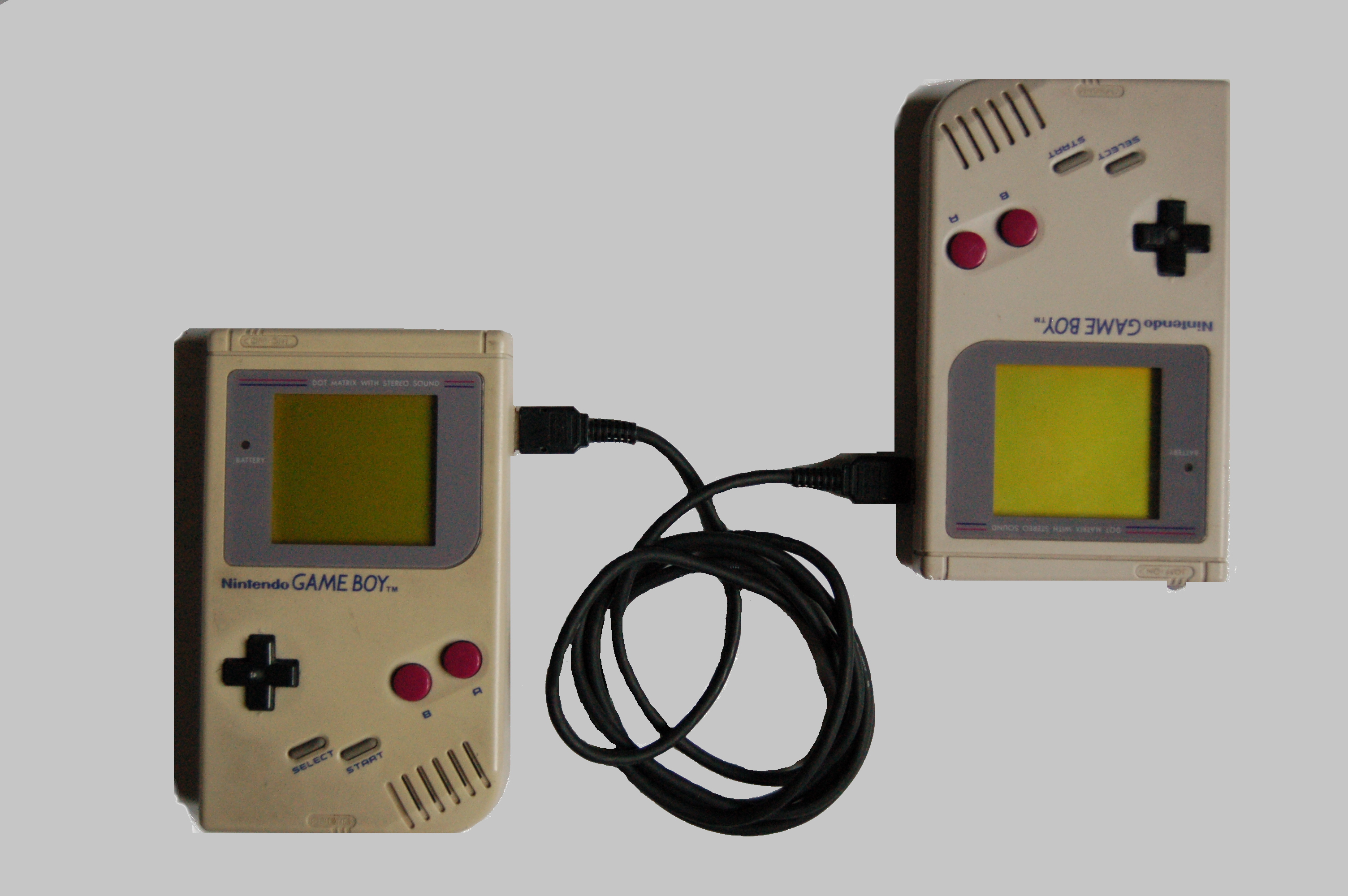 Gameboy